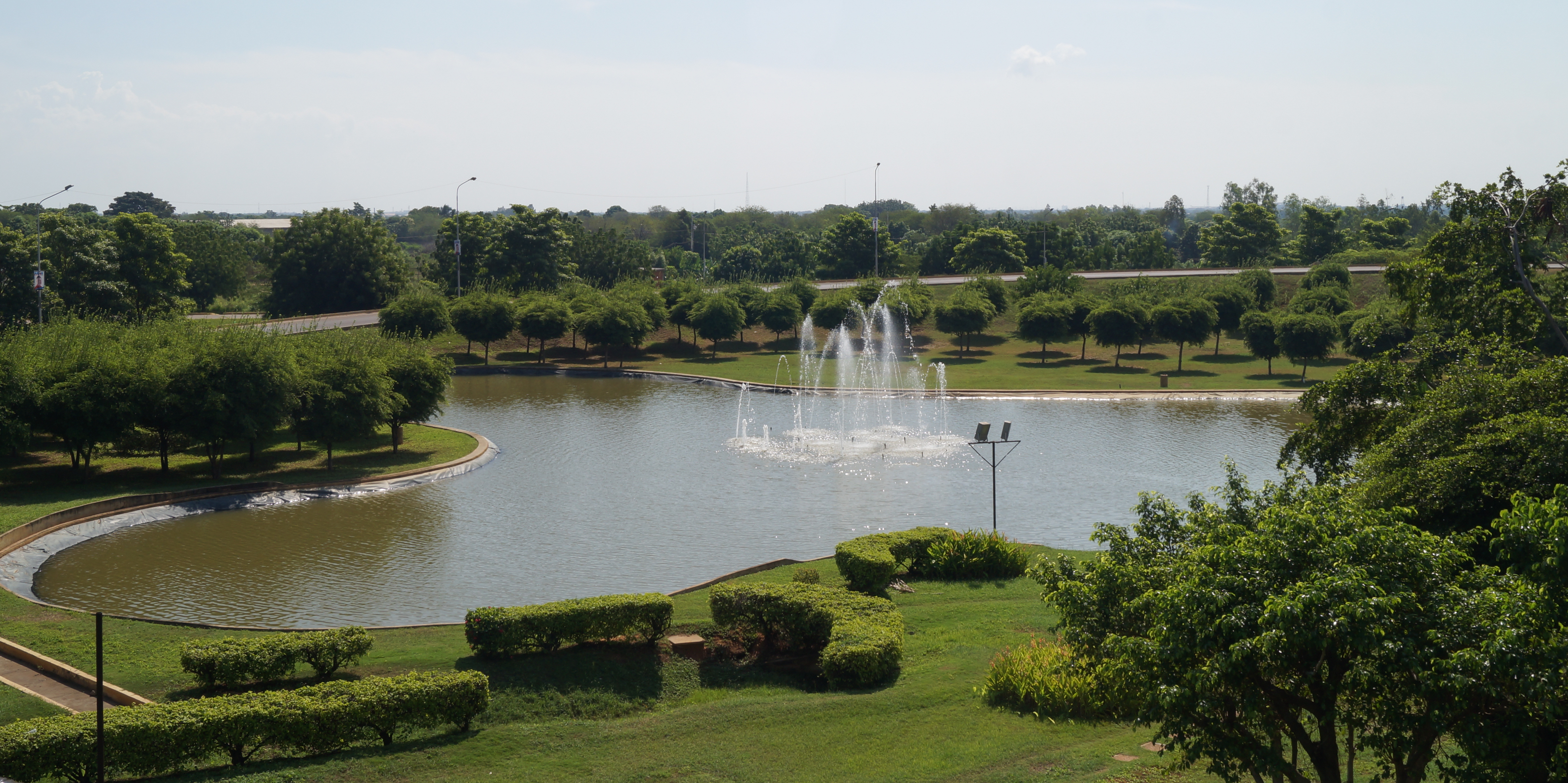 Laguna artificial y fuente de agua ubicada en el Distribuidor vial La Chinita, vía al aeropuerto internacional La Chinita. Maracaibo. Estado Zulia.